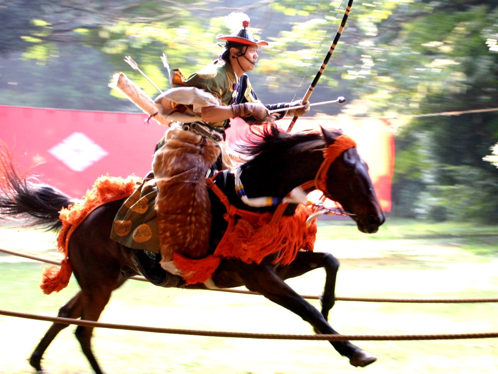 Yabusame: cerimonia degli arceri a cavallo - Tokyo al tempio Meiji Jingu tempio shintoista sito a Tokyo (Yoyogi)